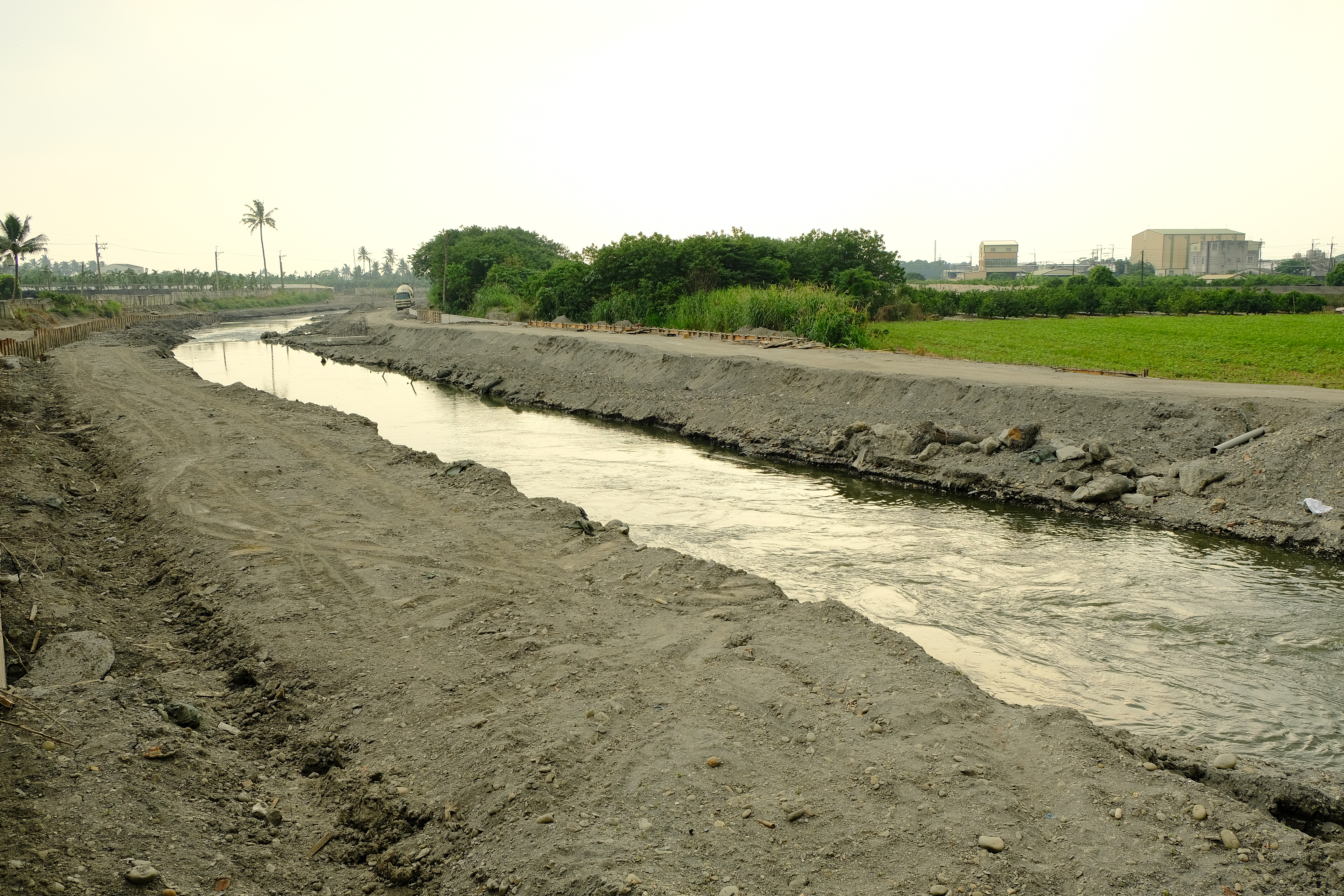 2018 Yanpu 武洛溪鹽埔段